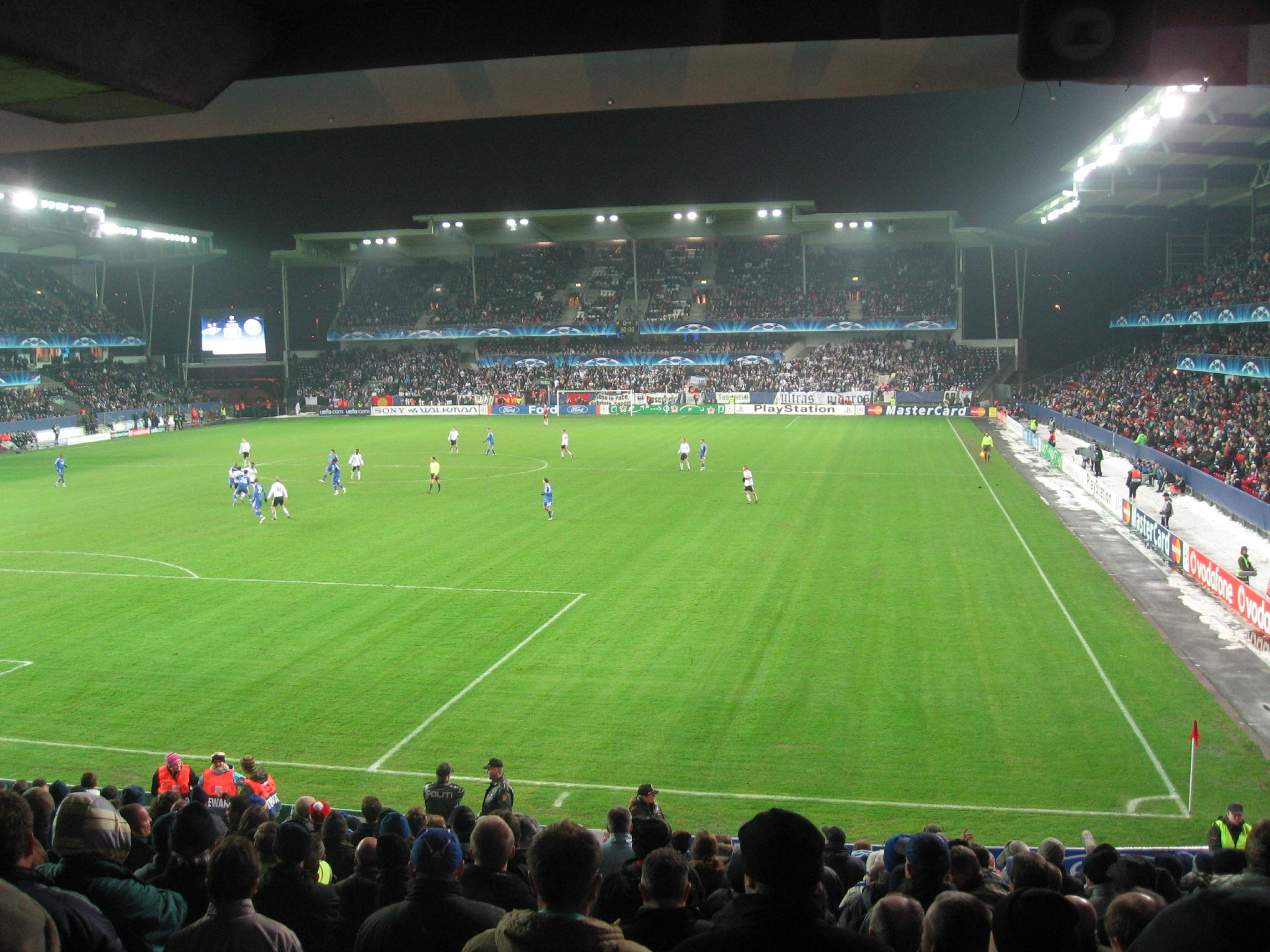 rosenborg (0) v CHELSEA (4) - 28/11/07